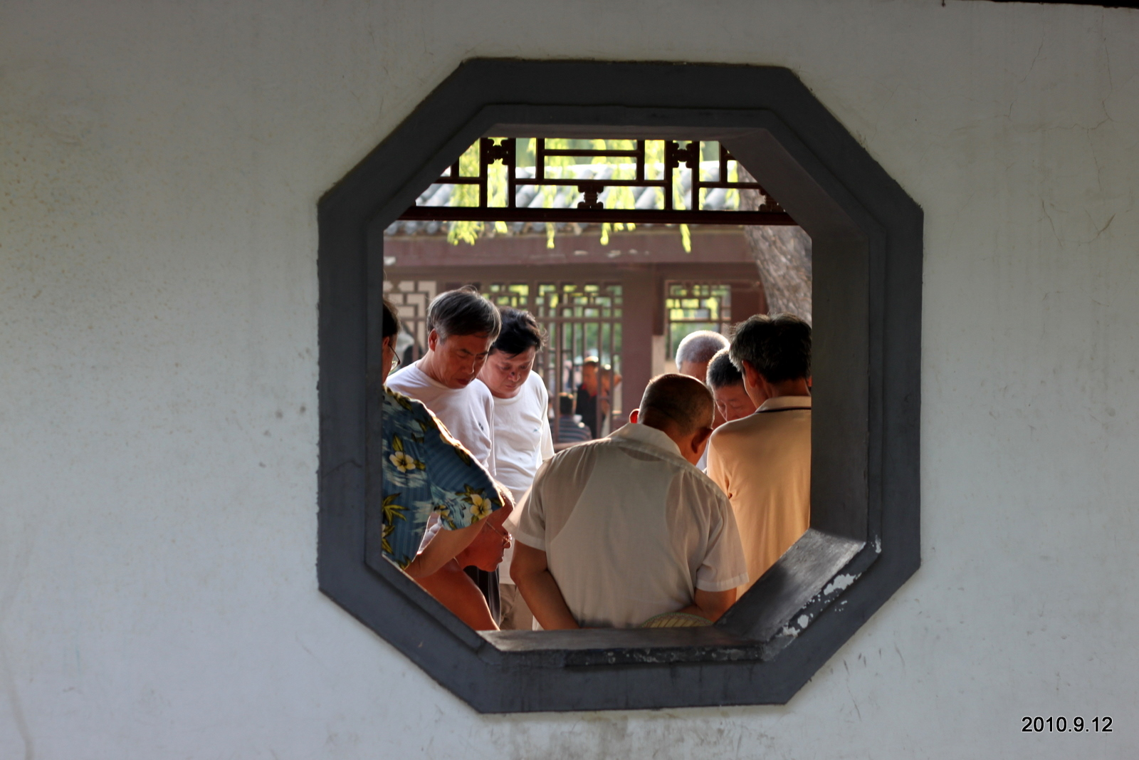 北京团结湖公园，找乐